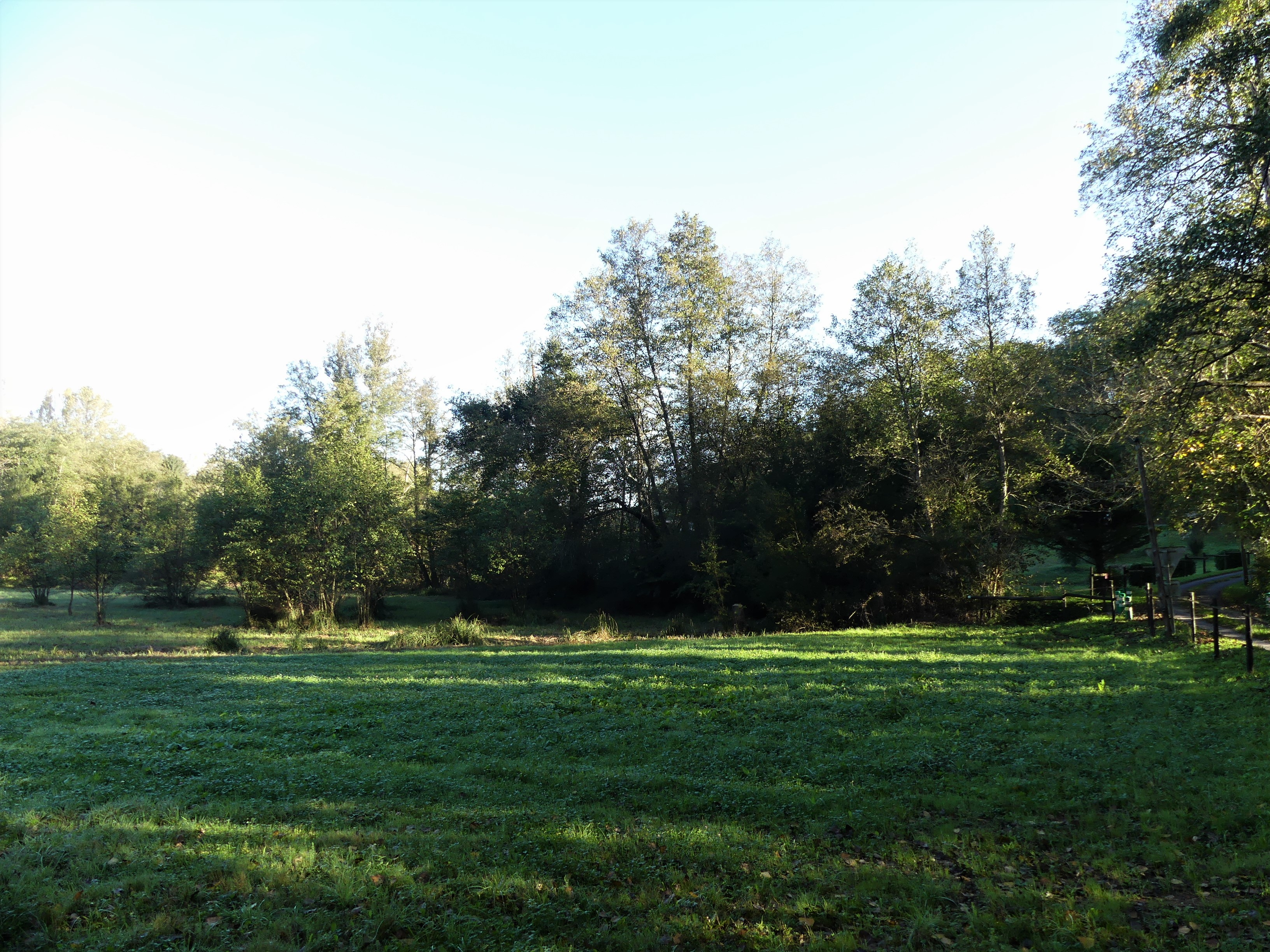 La vallée du ruisseau de Ladoux près du lieu-dit le Clos de la Caboussie, Maurens, Dordogne, France.